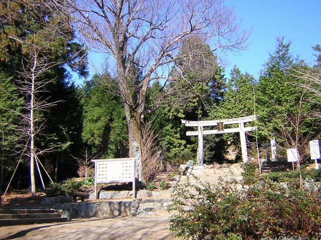 表参道の登山口